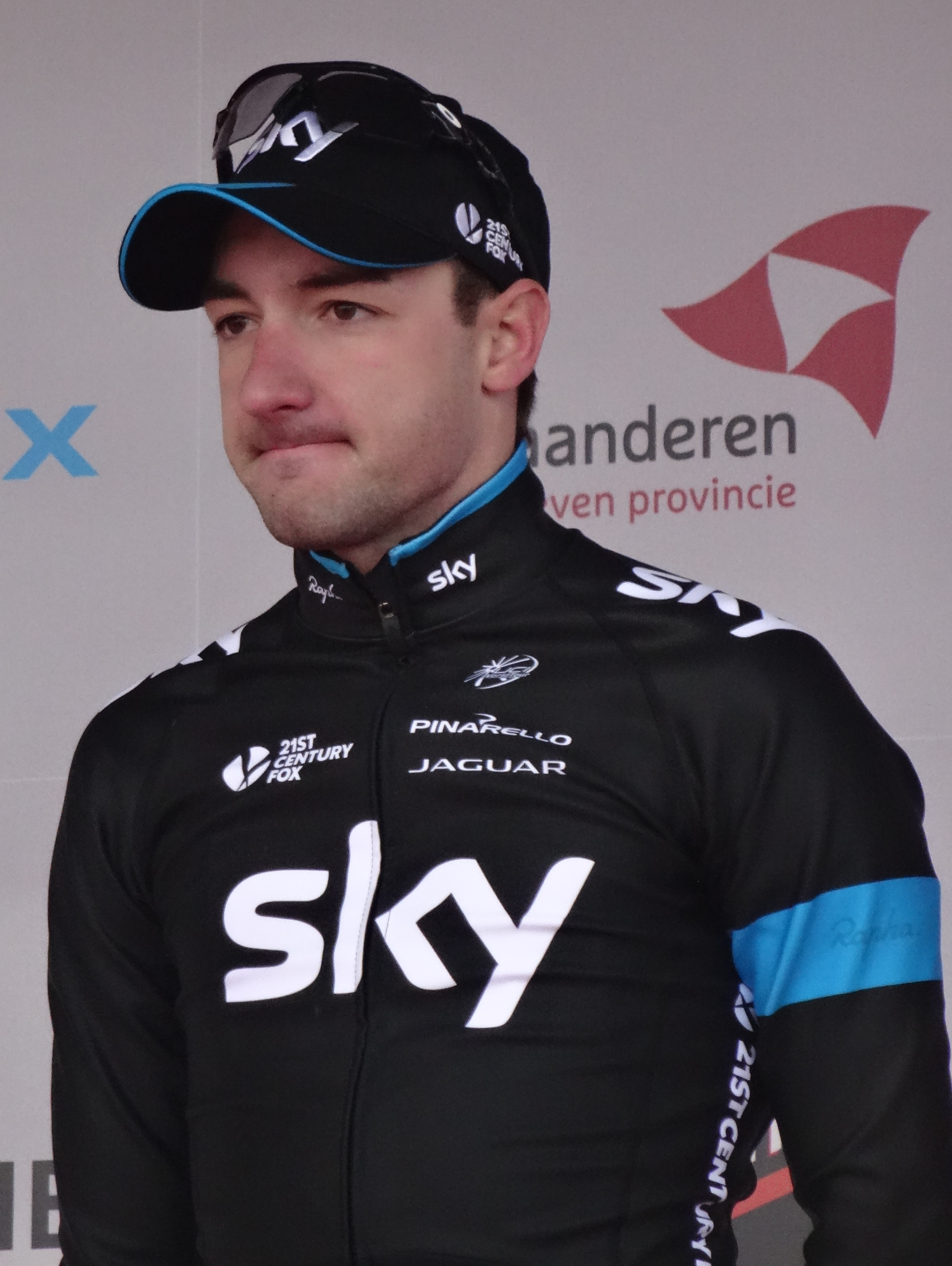 Reportage réalisé le dimanche 1er mars à l'occasion du départ et de l'arrivée de Kuurne-Bruxelles-Kuurne 2015 à Kuurne, Belgique.